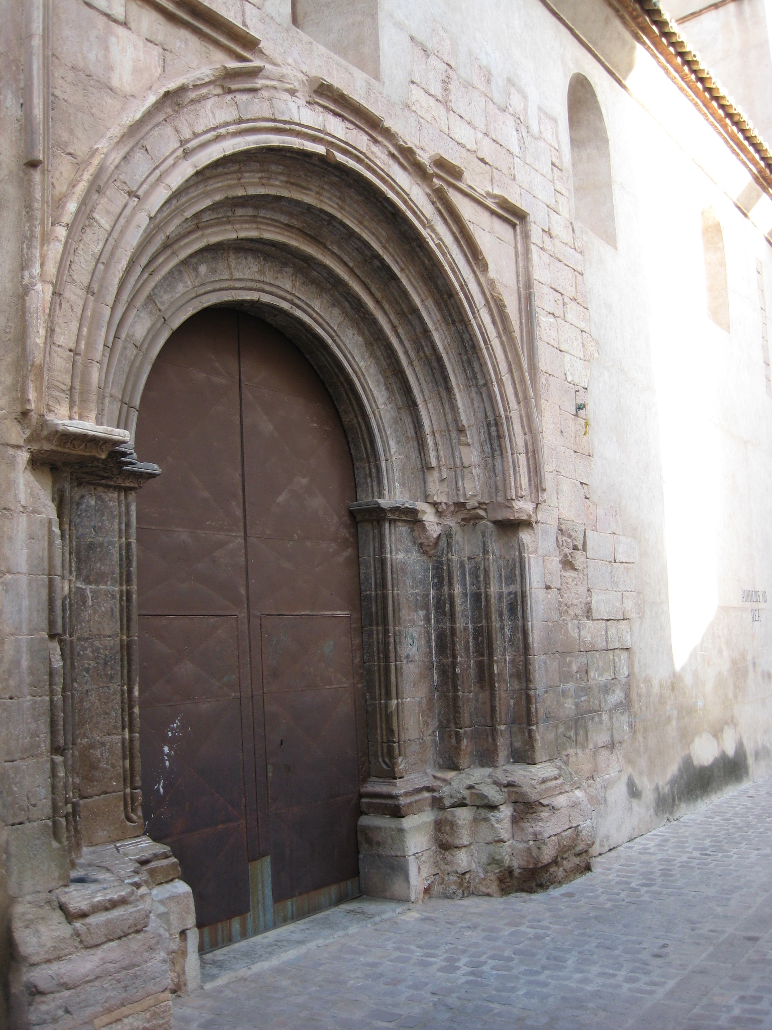 Església de la sang o de Santa Margarida d'Onda (Plana Baixa)